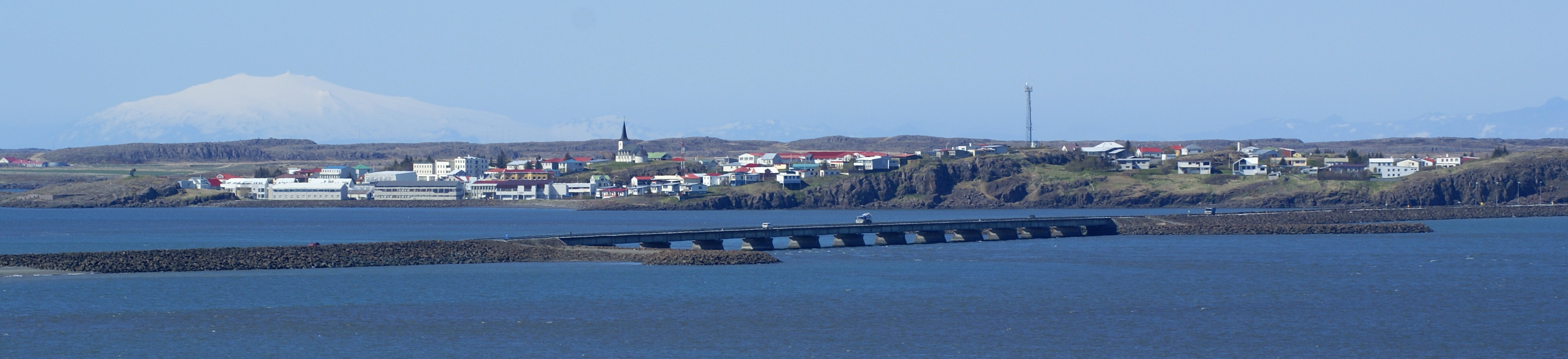 Borgarnes